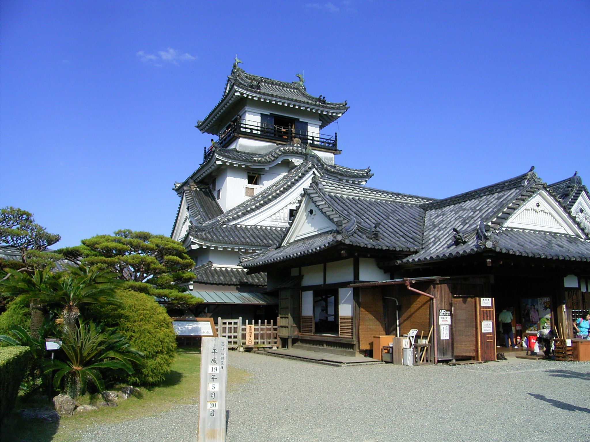 Kochi_Castle(高知城)